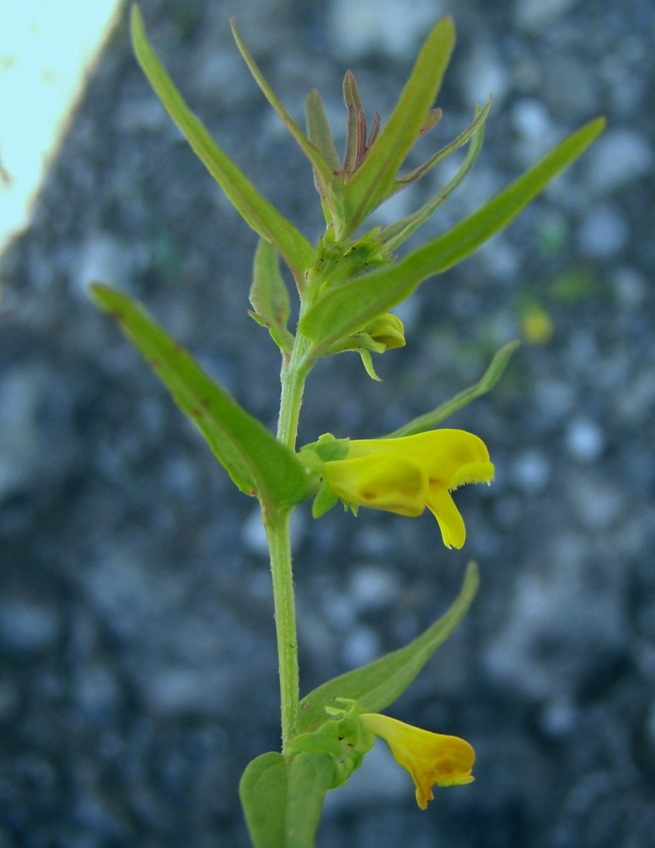 Melampyrum sylvaticum (pl. pszeniec leśny), habitat: West Tatra Mountains, Adamica